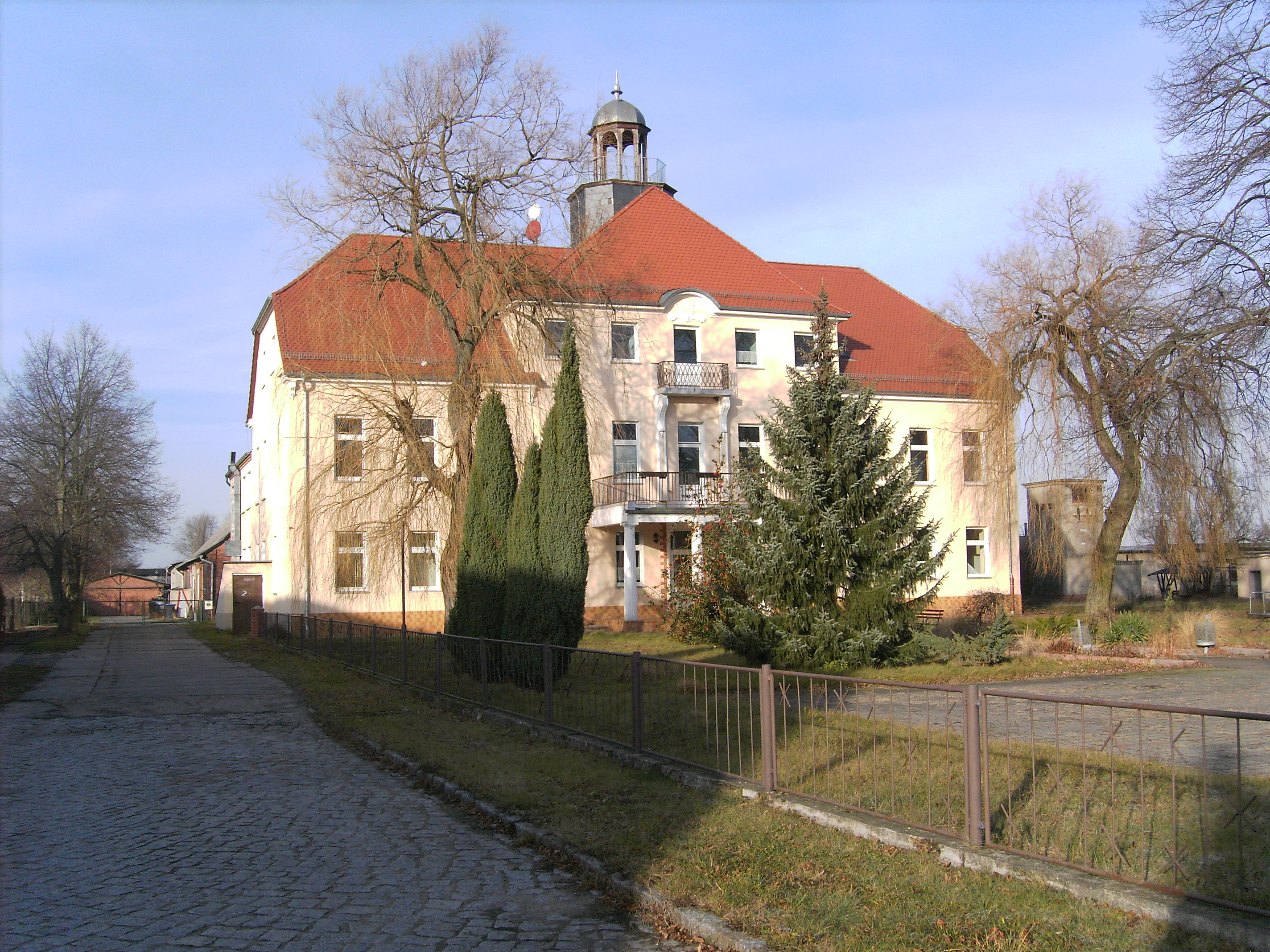 Gutshaus Schlagenthin, Hauptansicht